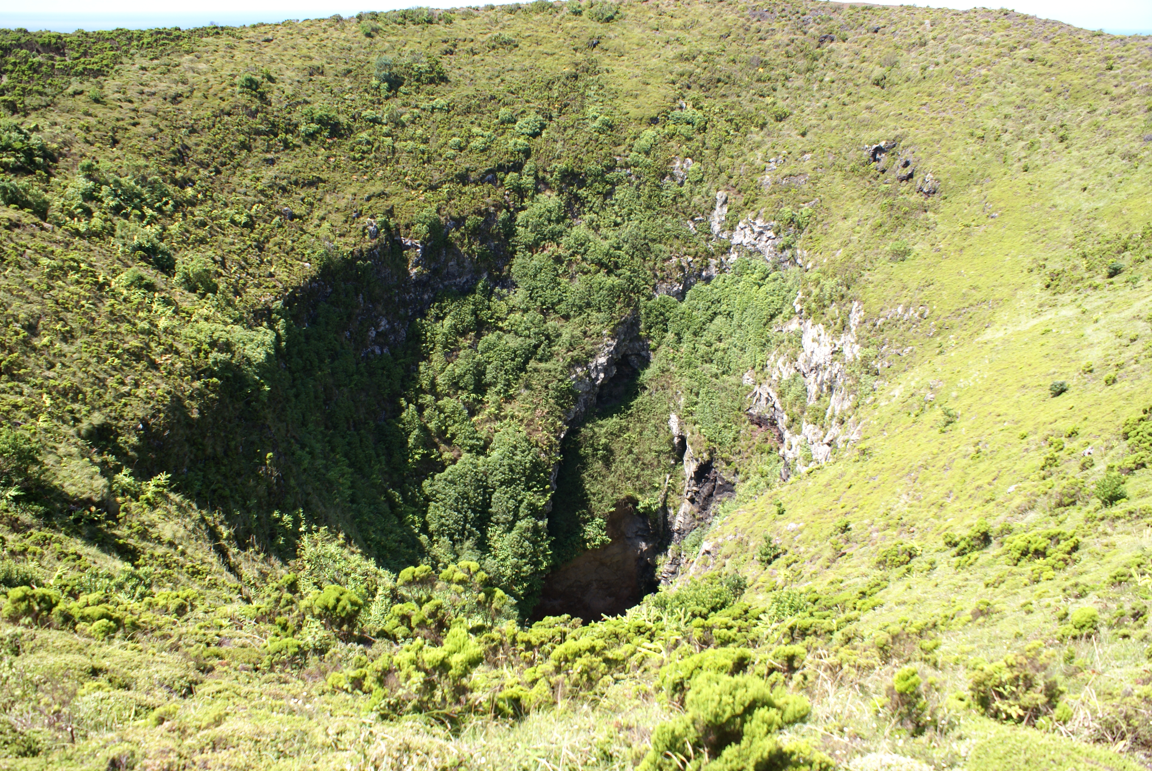 Pico da Caldeirinha, pormenor da cratera, Santa Cruz da Graciosa, ilha Graciosa, Açores, Portugal